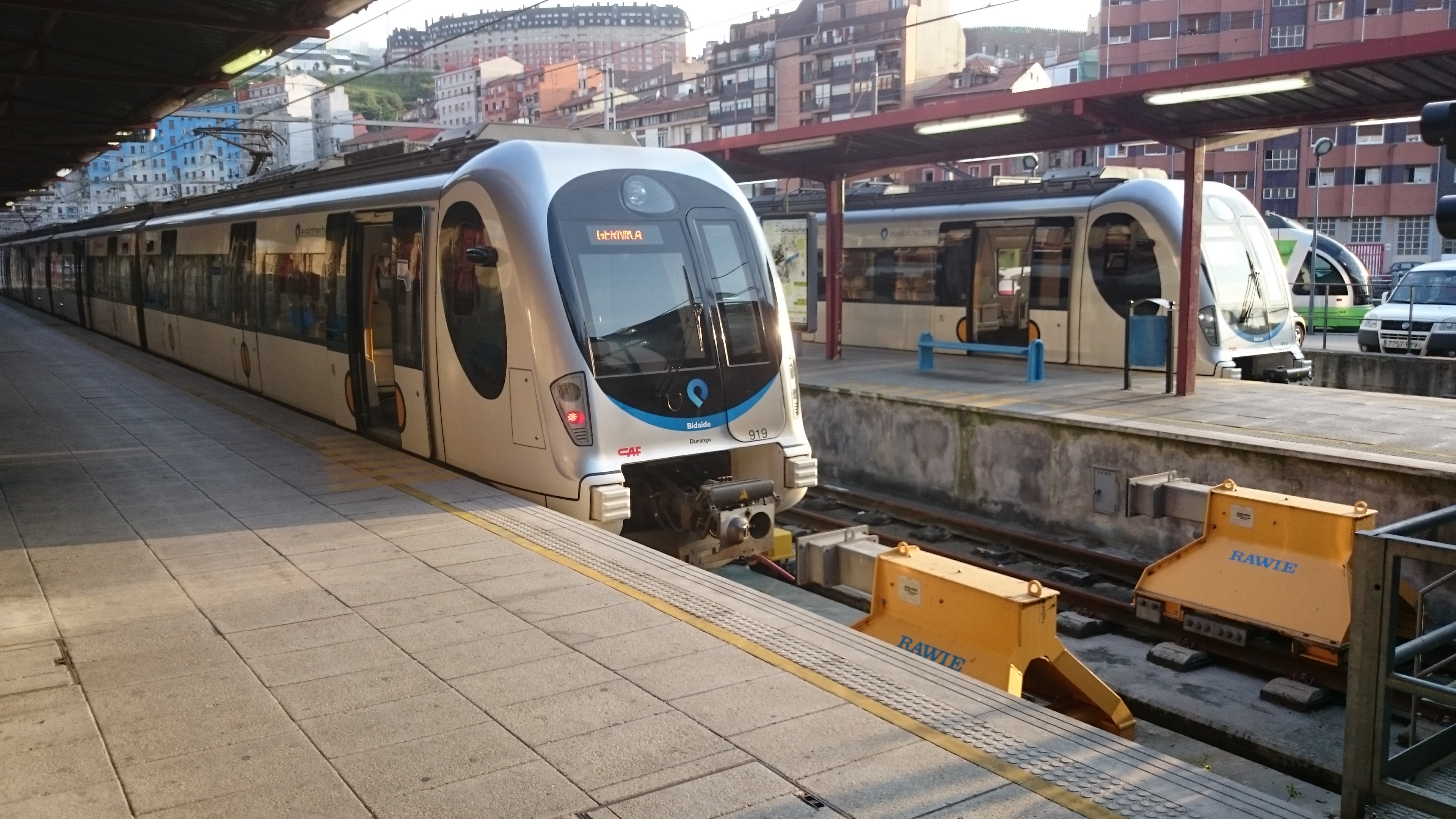 Trein naar Gernica